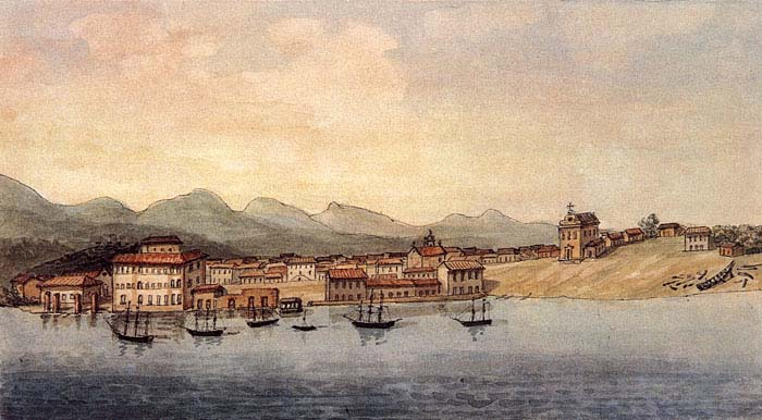 Guaratuba